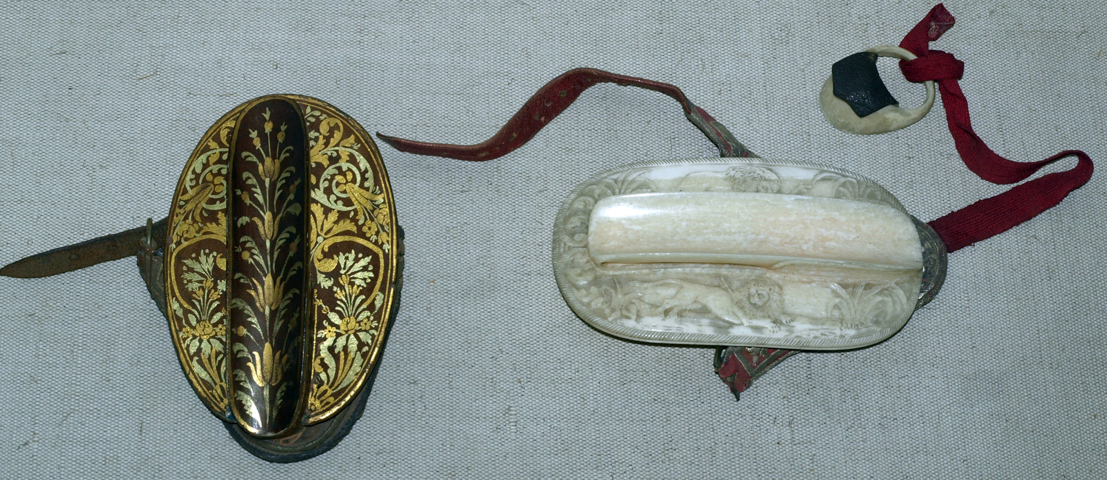 Deux exemplaires de siper (accessoire d'archerie turque) exposés au musée de l'armement à Topkapi Saray, Istanbul.